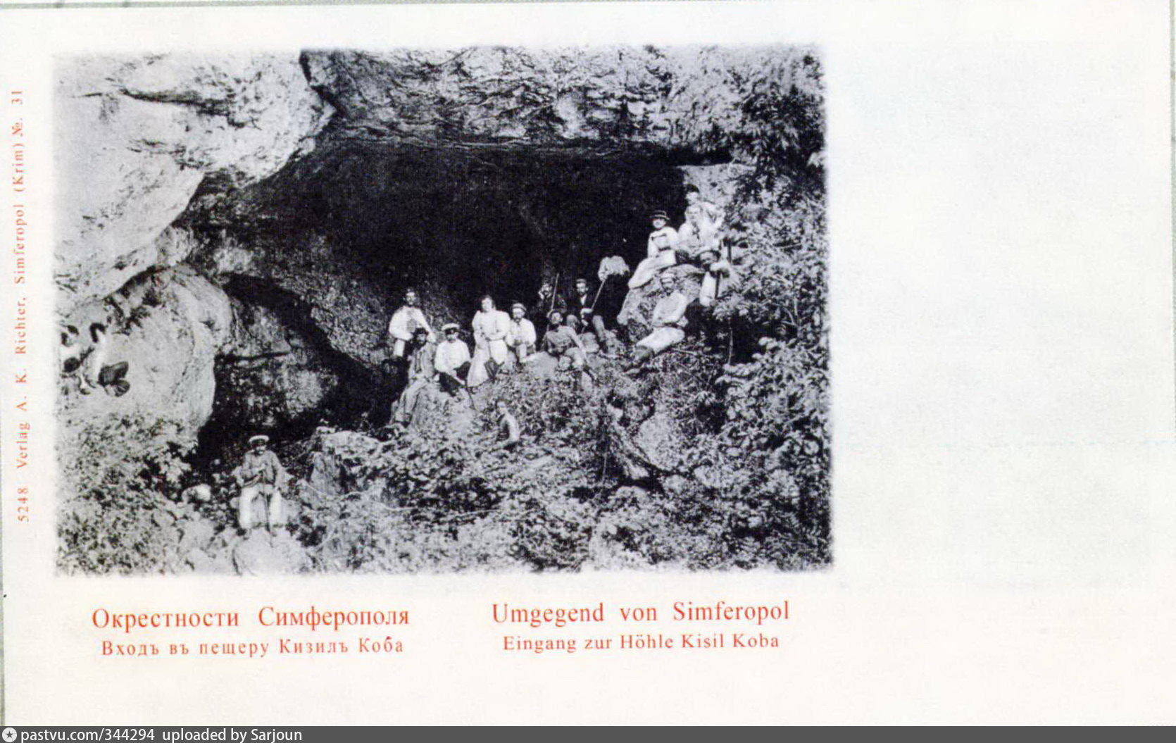 Красные пещеры Фотокарточка 1910-х